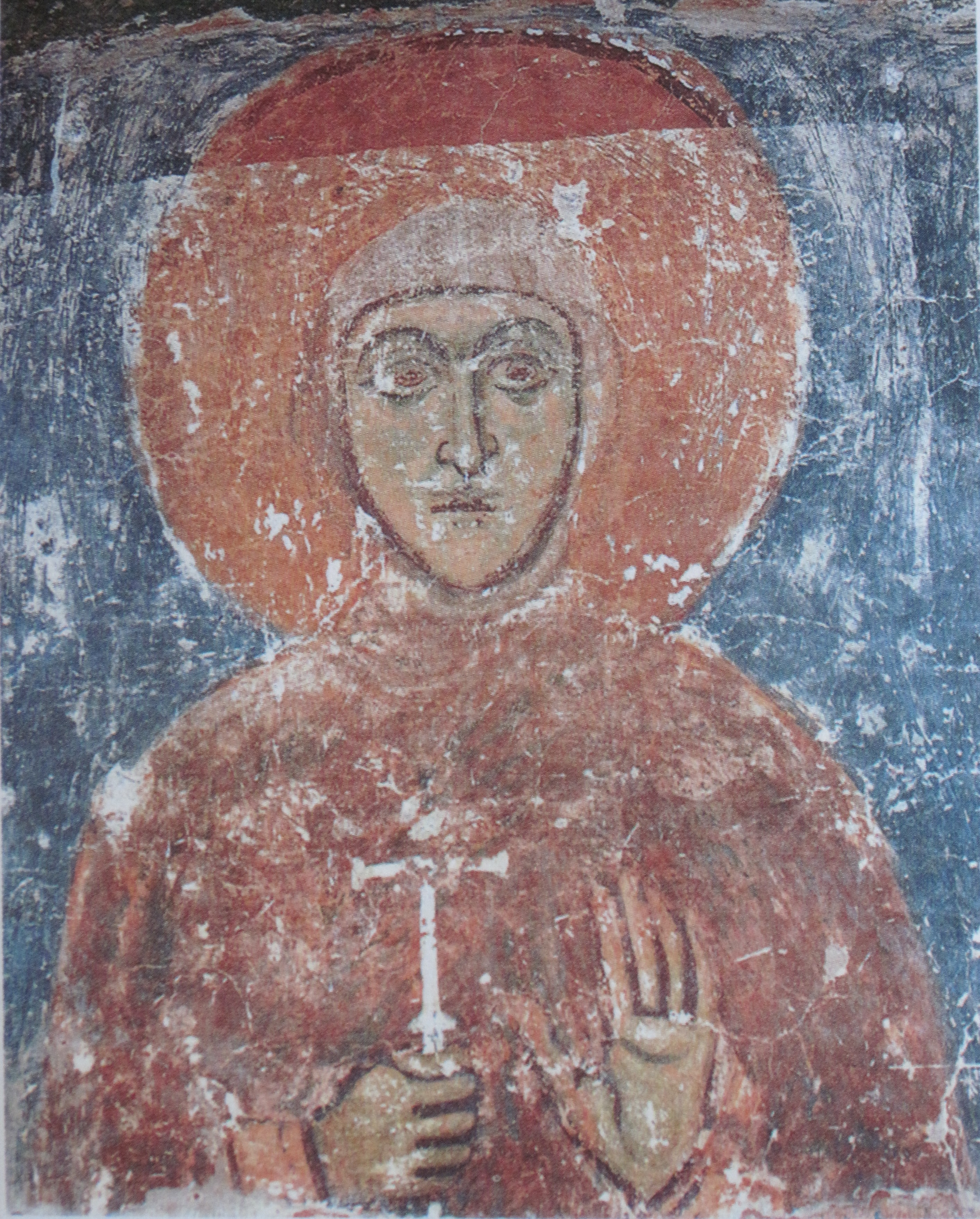 Беларуская (тарашкевіца): Роспіс сцен Спаса-Ефрасіннеўскага манастыра